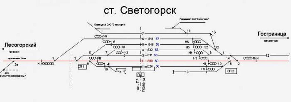 Схема Светогорск.jpg